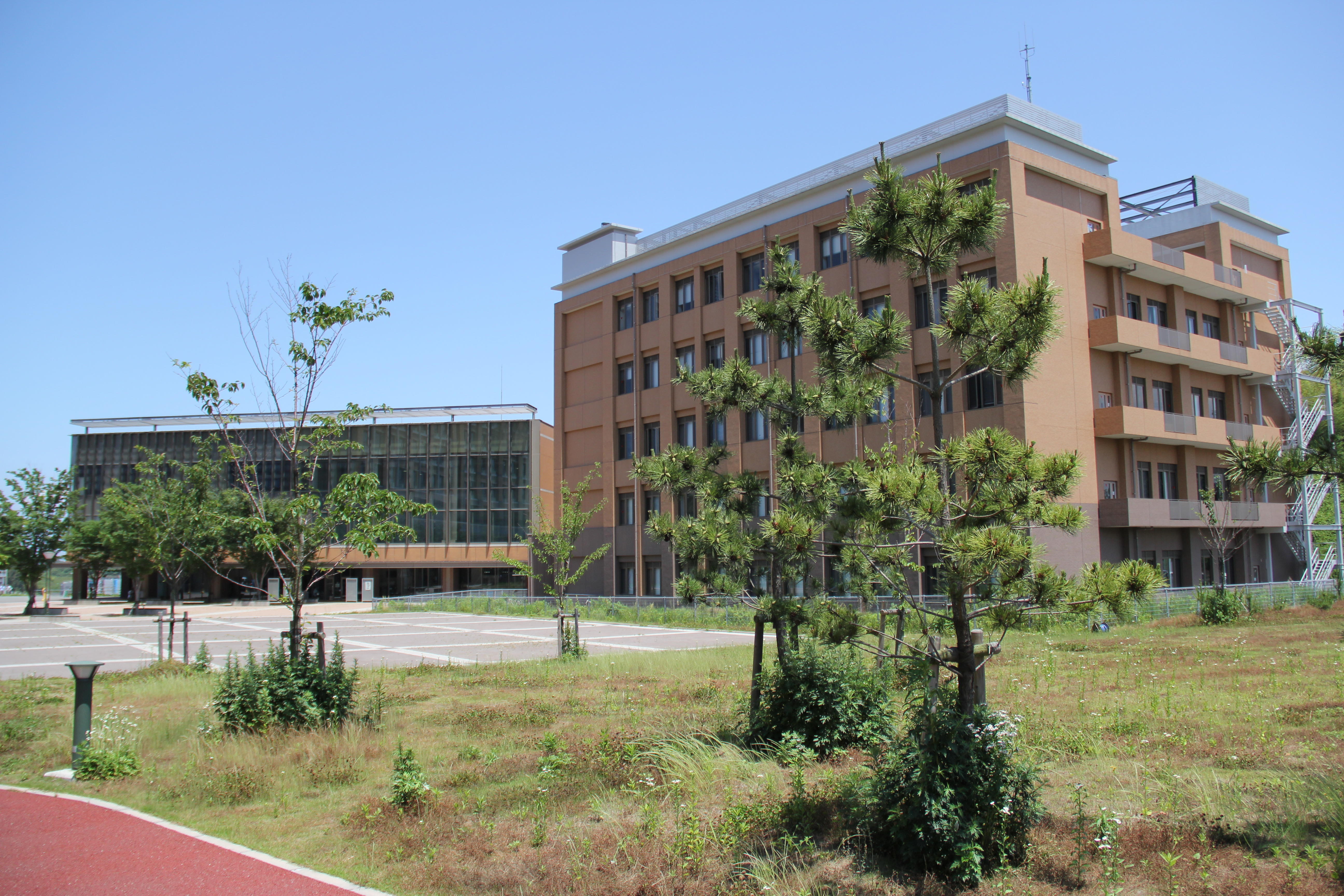 九州大学伊都図書館（現：理系図書館）と数理学研究教育棟（現：情報基盤研究開発センター） Canon EOS 60D